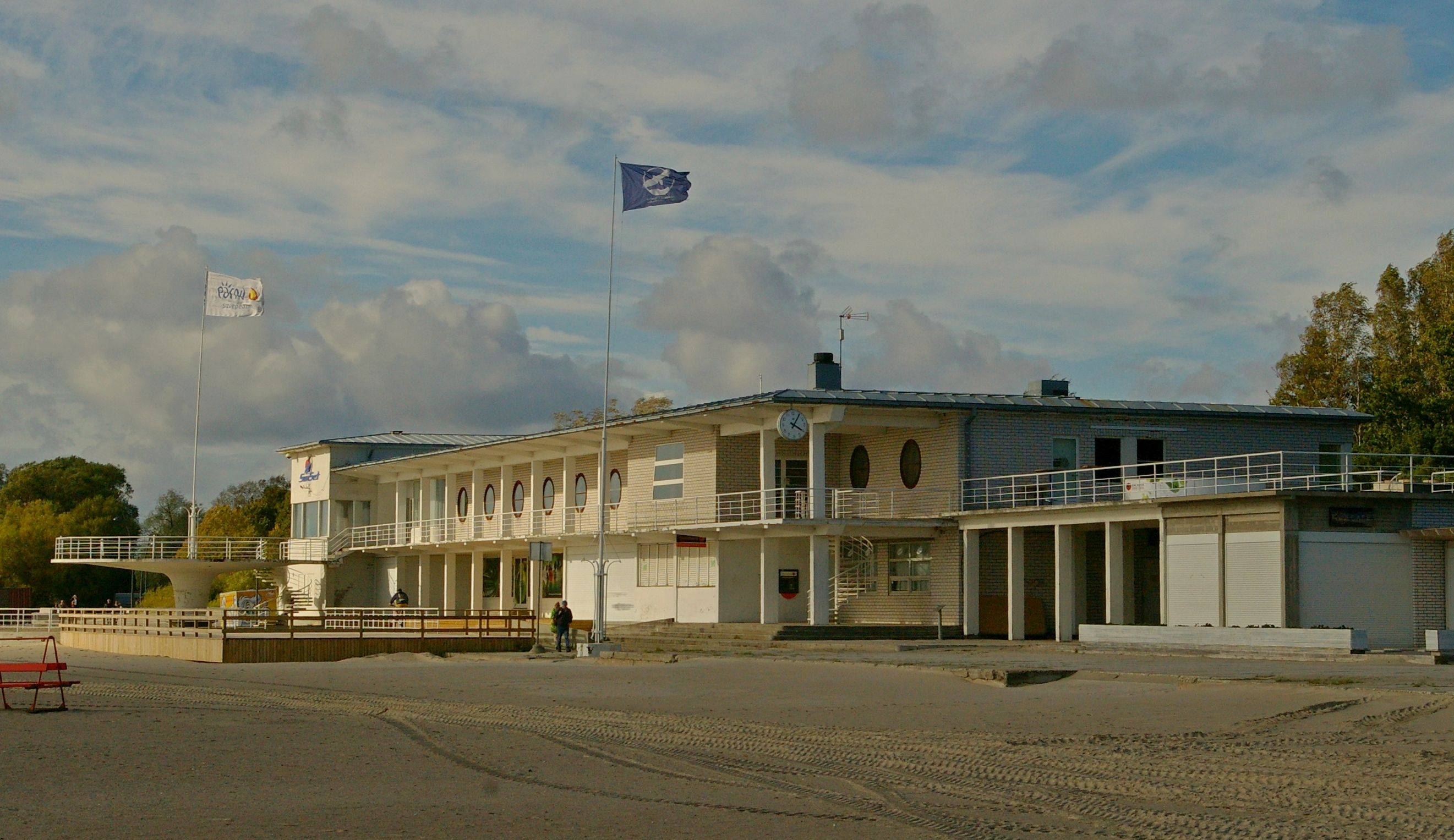 Pärnu Rannakohvik, Ranna pst 3